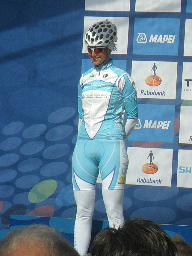 Roberta Monaldini (San Marino) voor de start van het Wereldkampioenschap 2012 in Valkenburg, Nederland.